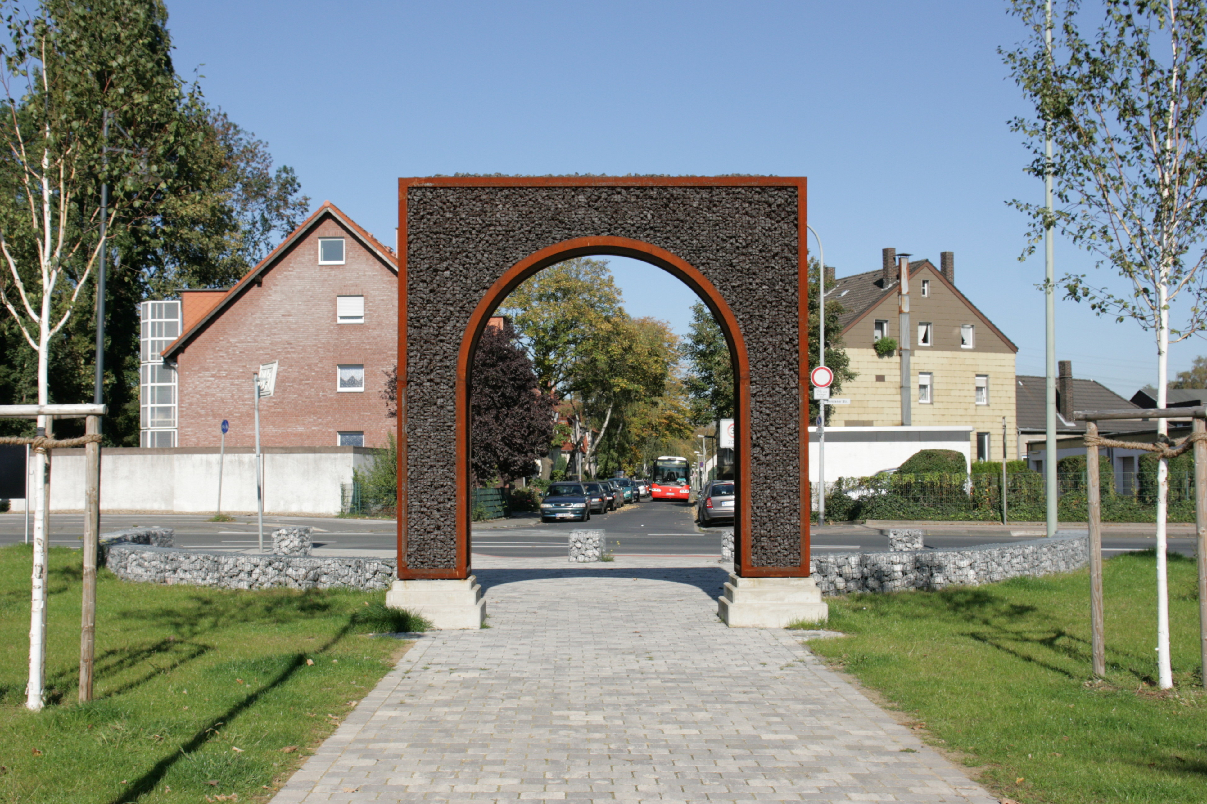 „Triumphbogen der Kohle“ von Helmut Bettenhausen am Gahlenschen Kohlenweg, Kulturpark Unser Fritz, Dorstener Straße in Herne